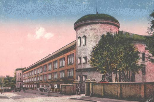 Ulm. Kaserne des Feldart Rgt. Nr. 13 in der Oberen Donaubastion.